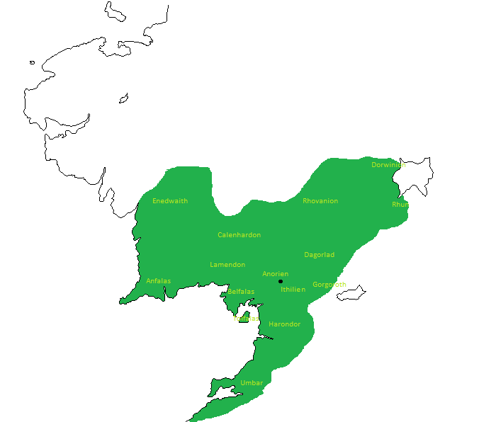 Il Regno di Gondor alla sua massima espansione